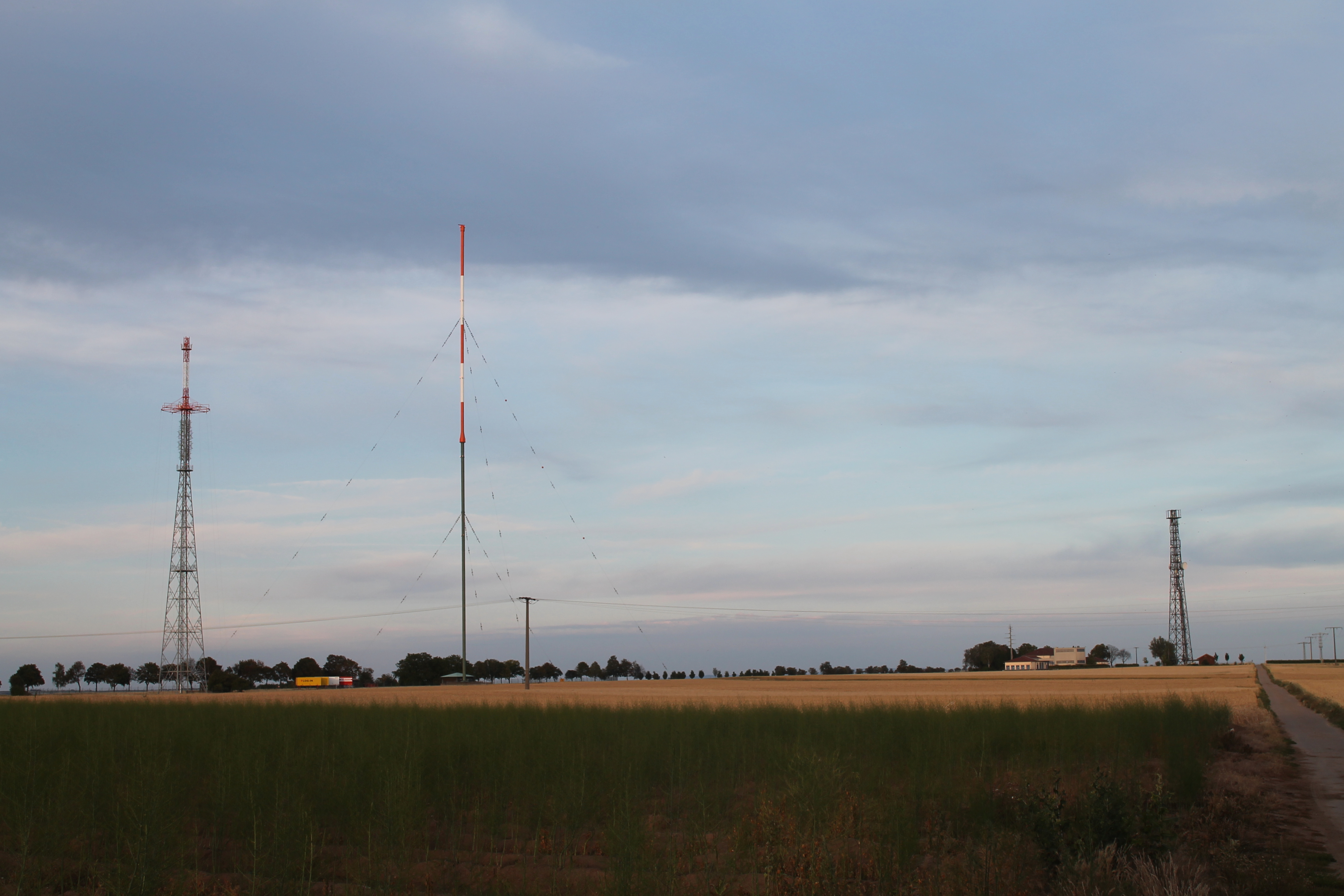 Rheinsender